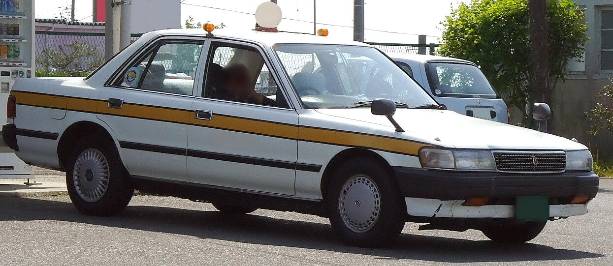 トヨタ・マークII（X80系セダン・タクシー仕様）